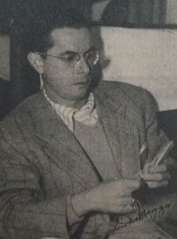 1951年の訪日時のドム・ディマジオ